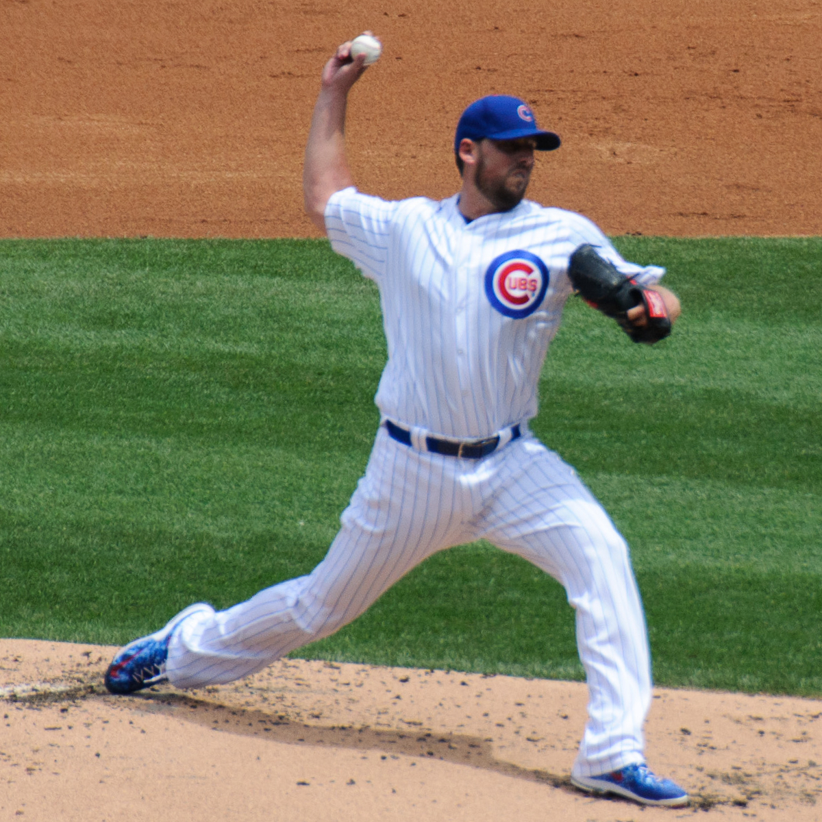 John Lackey